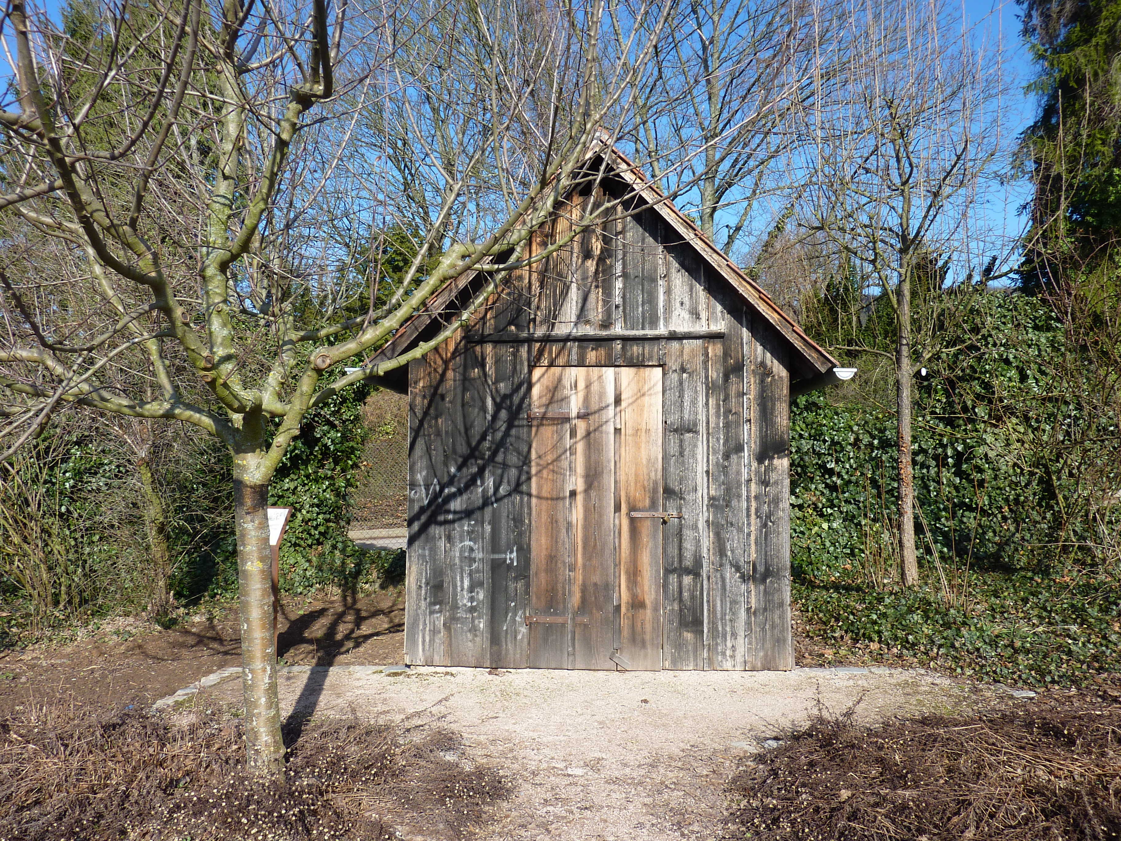 botanischer Obstgarten Heilbronn